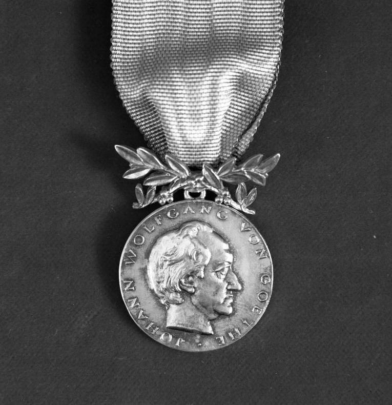 Orden im Besitz von Bundespräsident Walter Scheel Goethe-Medaille am Bande